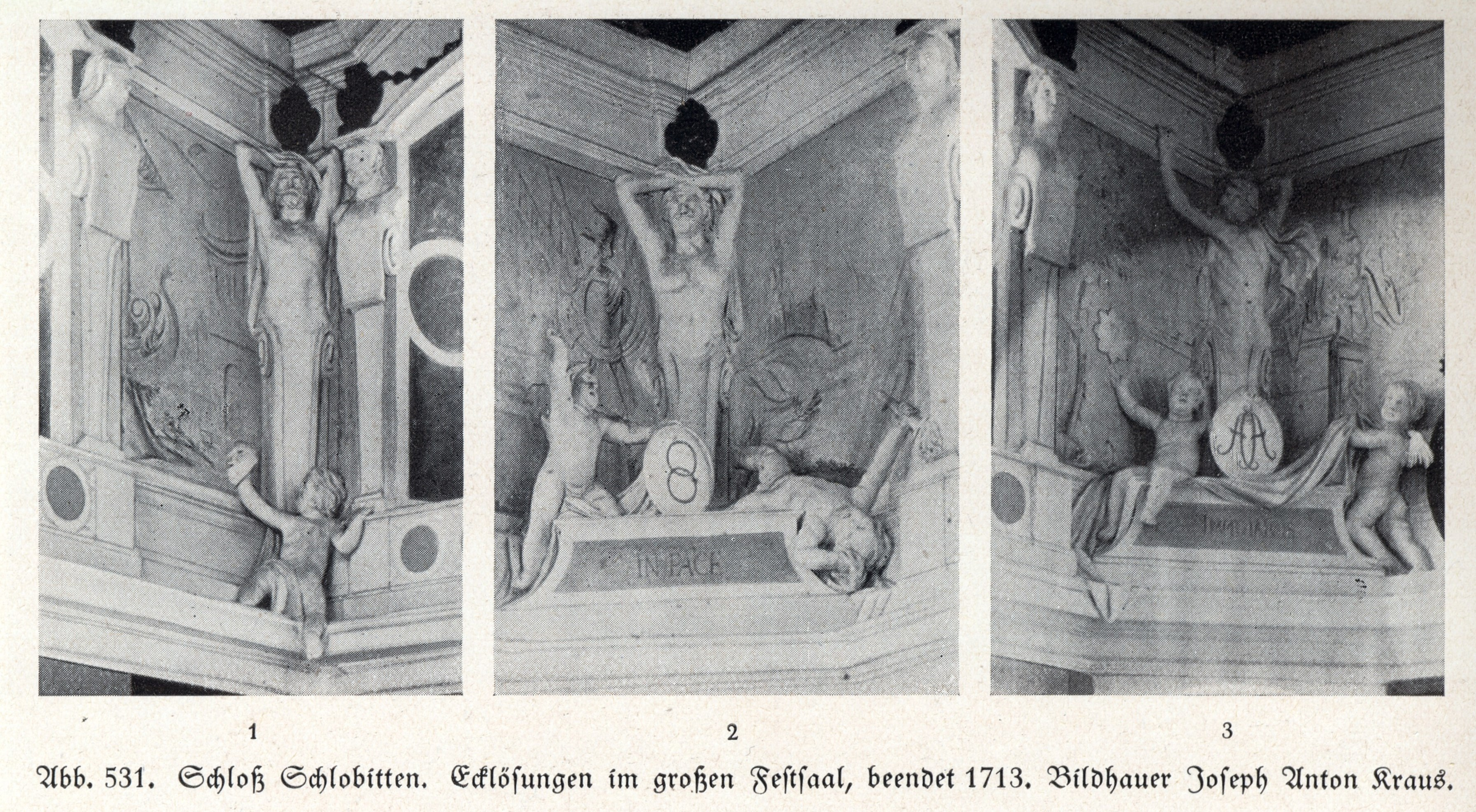 Schloss Schlobitten, Großer Festsaal, Ecklösungen, 1713, Bildhauer Joseph Anton Kraus